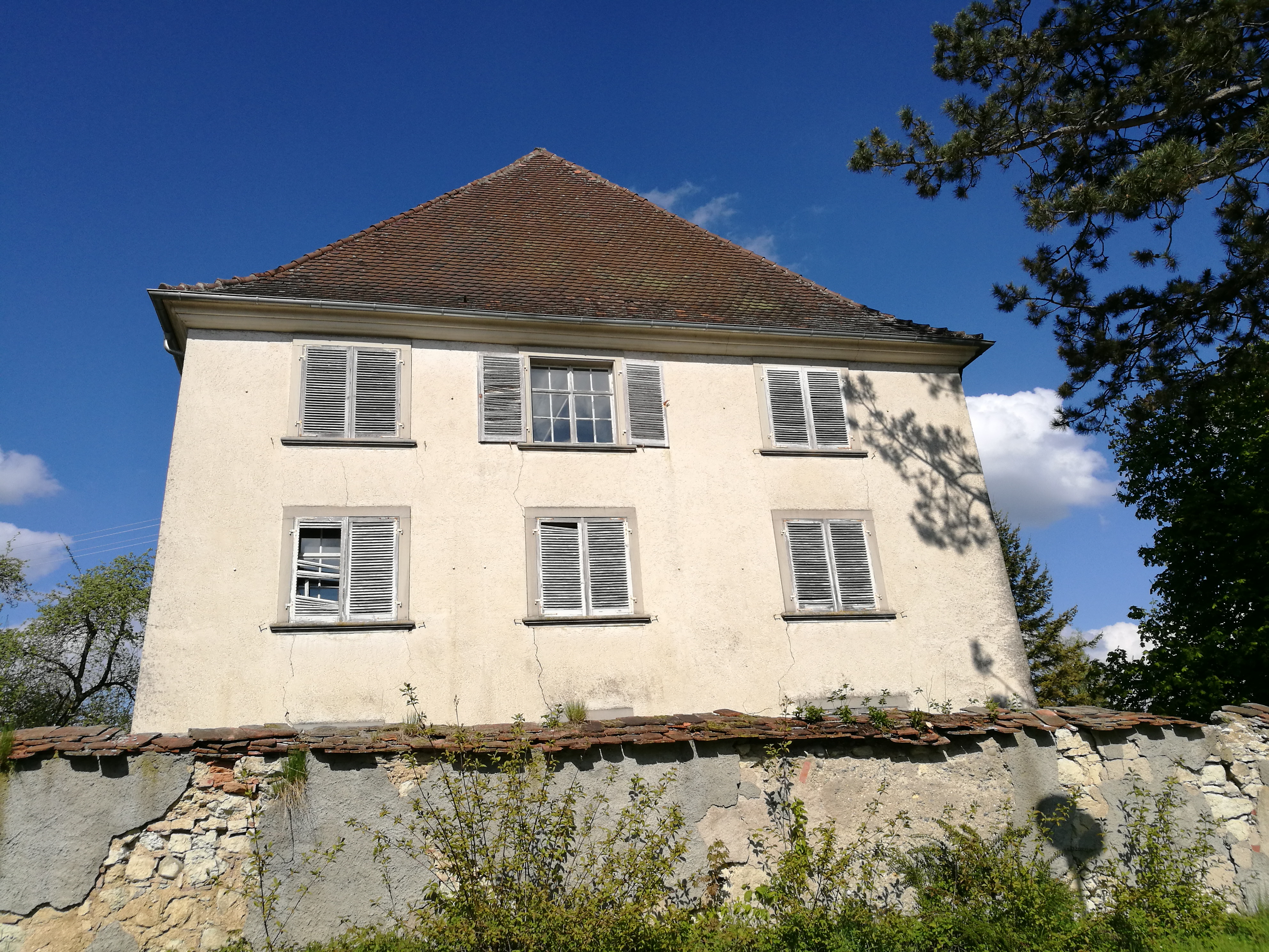 Deutschland (D) - Baden-Württemberg (BW) - Landkreis Konstanz (KN) - Mühlingen: Schloss Mühlingen